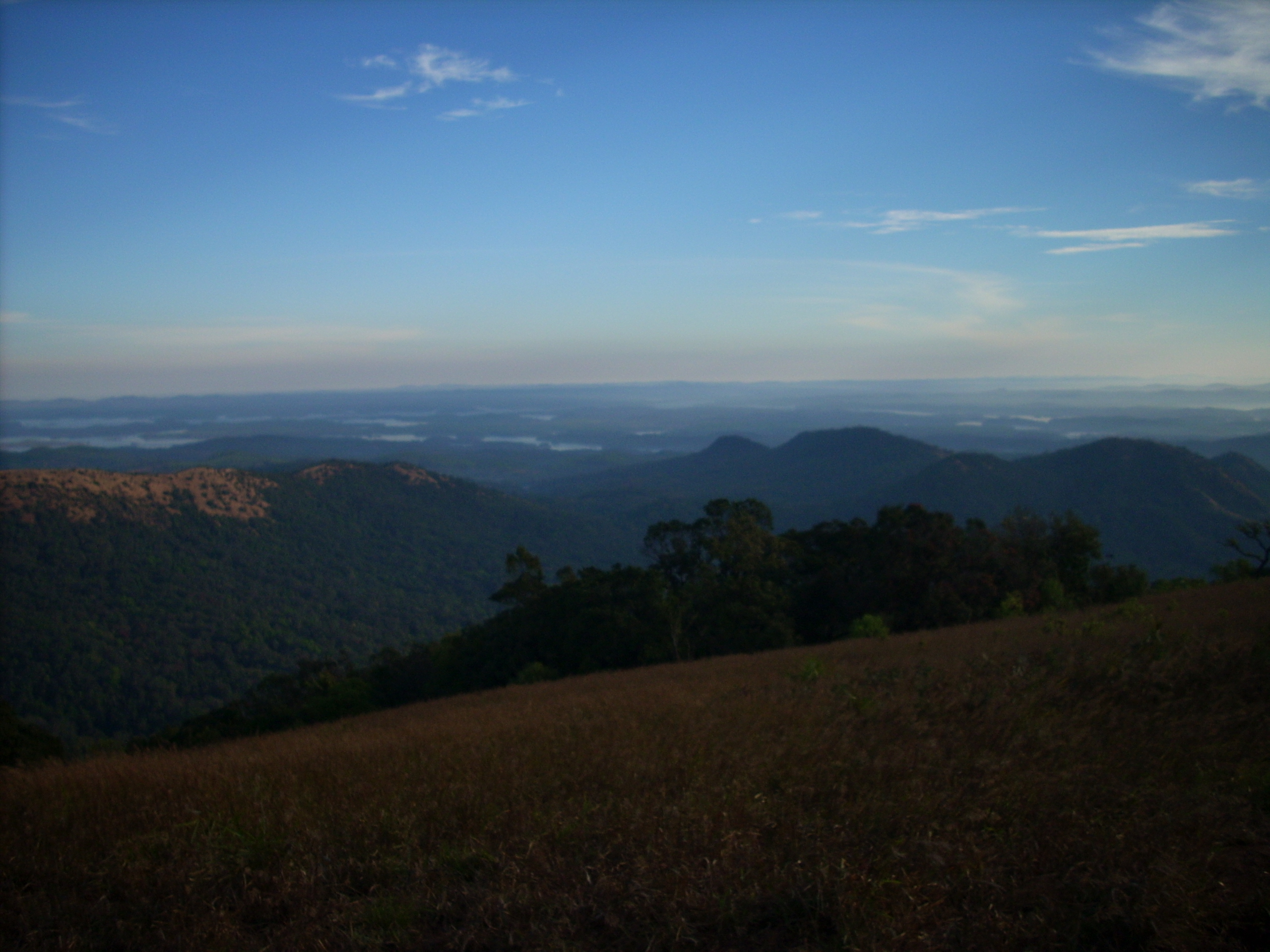 കുടജാദ്രി മല ഉച്ചി